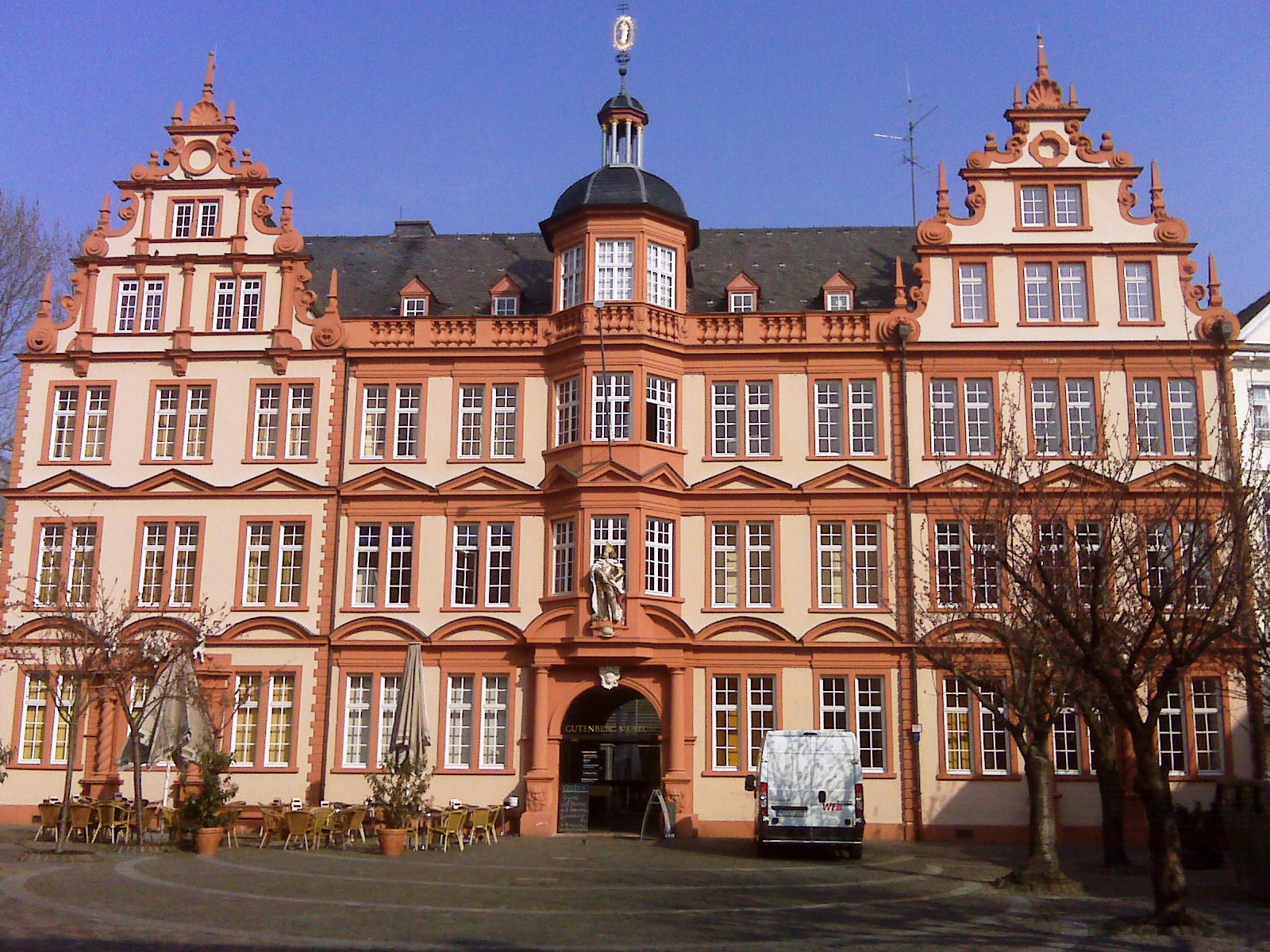 Il Palazzo "Zum Römischen Kaiser", sede originaria del Museo Gutenberg, 2011